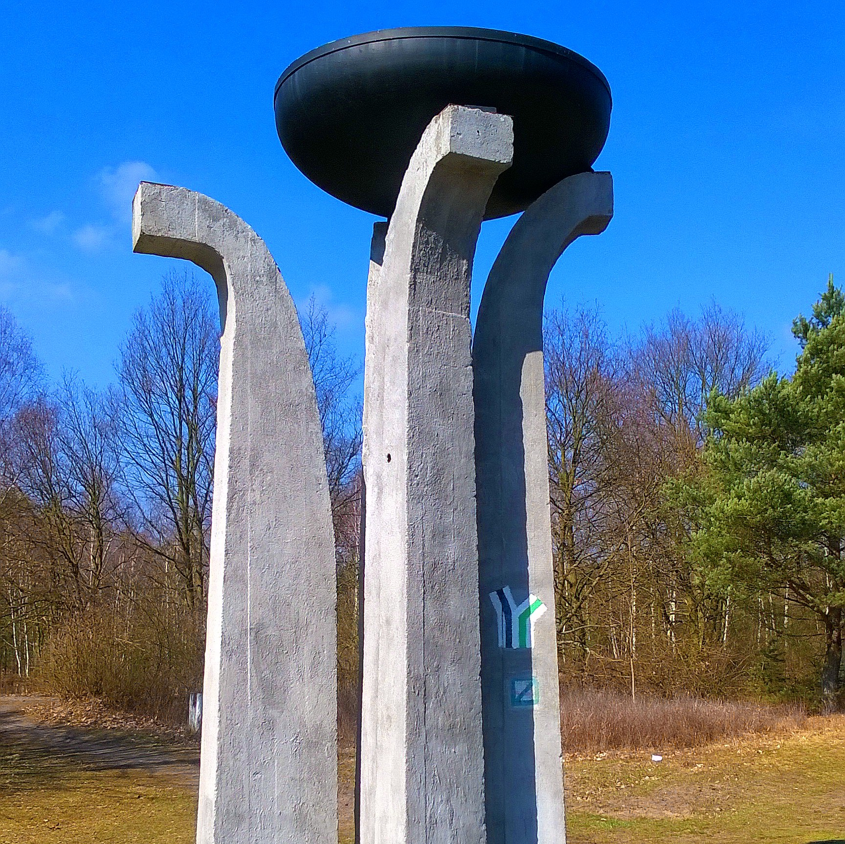 Fort VII Twierdzy Toruń7